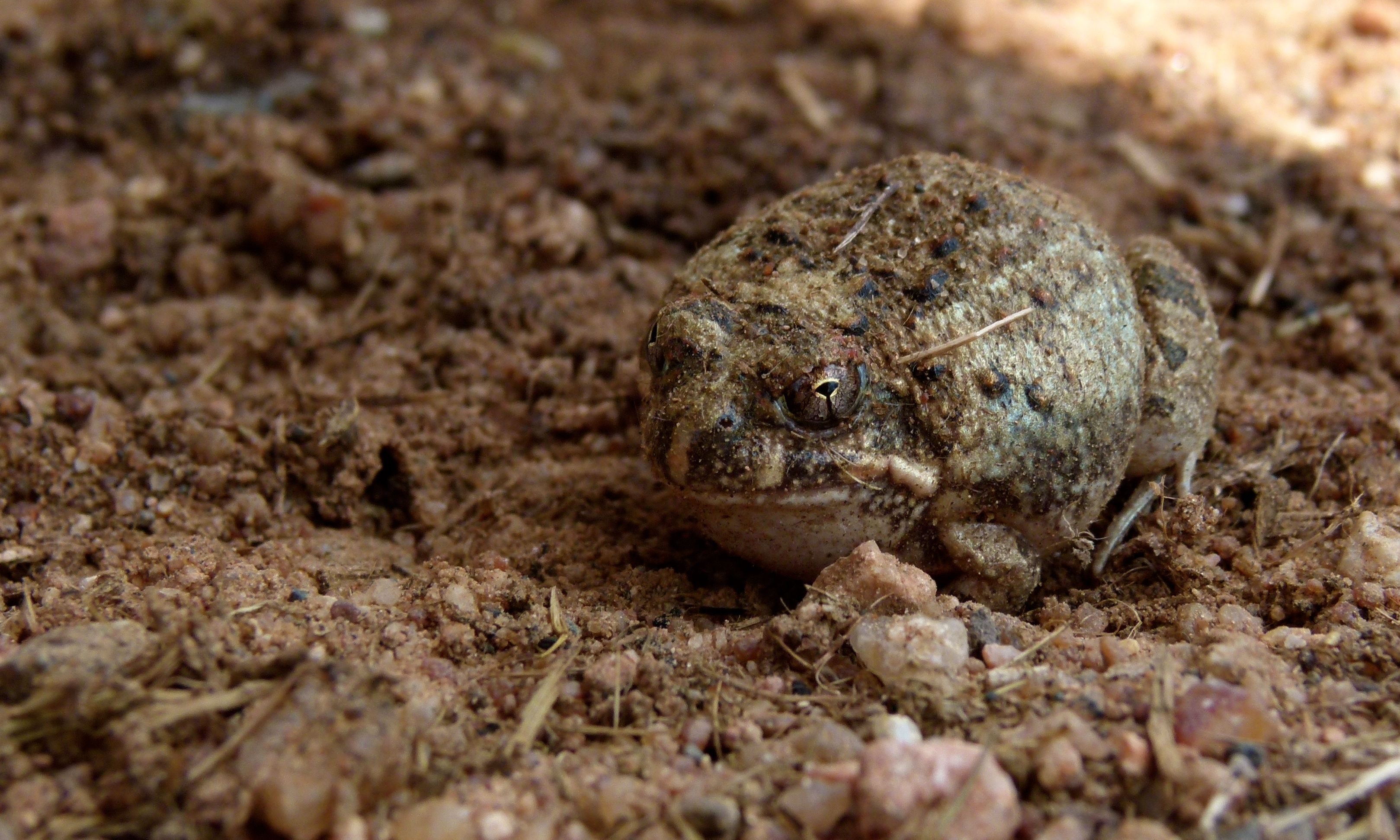 S131 near Shivhulani, Kruger NP, SOUTH AFRICA